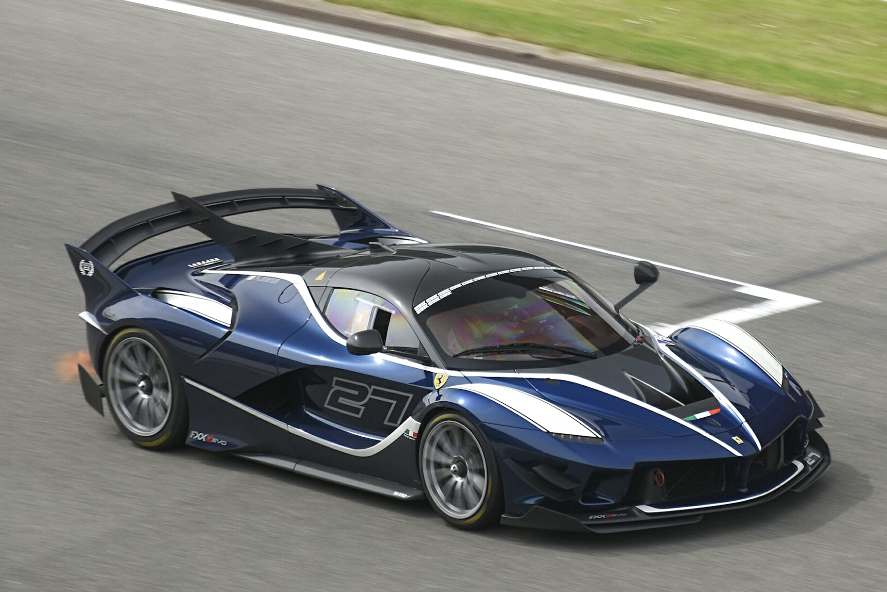 S/N : 211251 Numéro : 27